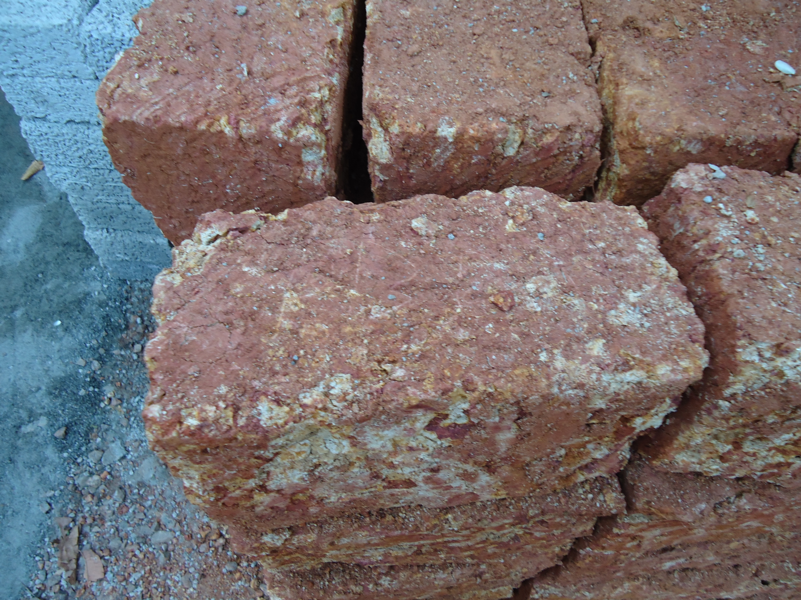 Chenkallu